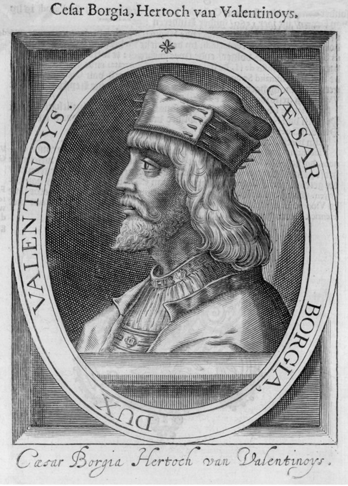 Cesare Borgia, Hertoch van Valentinois.